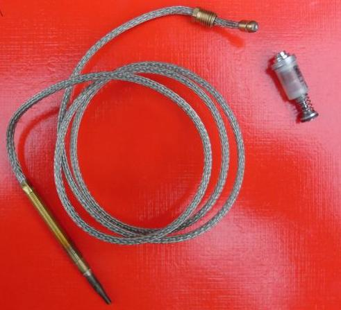 Thermosicherung eines Gasherdes mit Thermoelement,Leitung und Magnetschalter